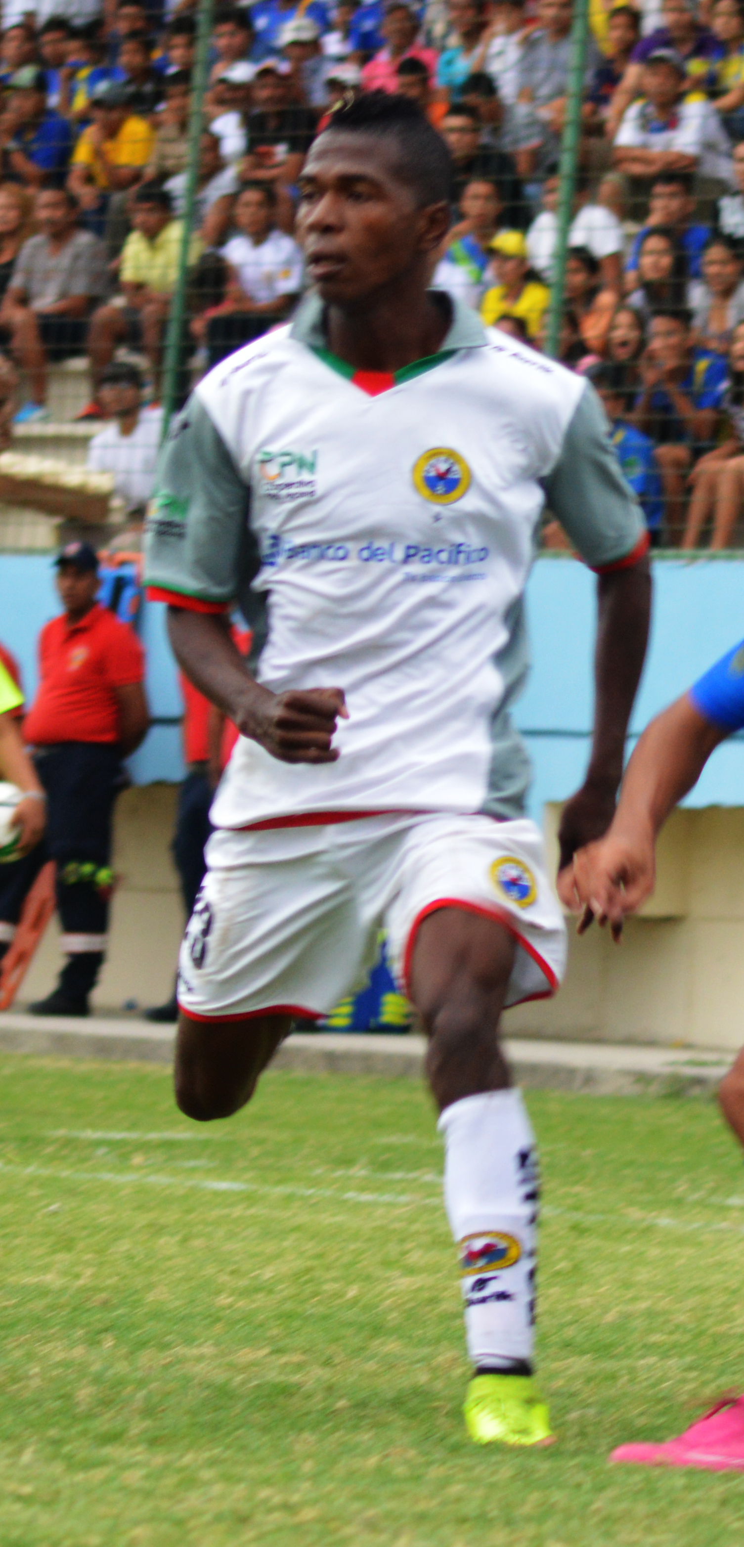 Carlos Orejuela Quiñónez jugando para Espoli en 2015